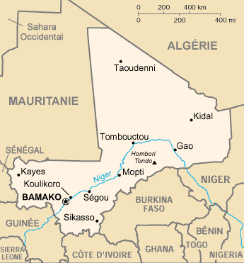 Carte du Mali CIA map of Mali (in French) Source : CIA World Factbook (traduite/translation) Historique de la carte originale Image:Mali_sm03.jpg (suppr) (actu) 15 septembre 2004 à 12:32 . . BernardM . . 350x376 (27969 octets) (carte du Mali francisée) (suppr) (rétab) 22 novembre 2003 à 21:45 . . Rinaldum . . 350x376 (27182 octets) (copié de wiki en;) Fichier GIMP disponible : Image:Mali_sm03.xcf (version de BernardM)